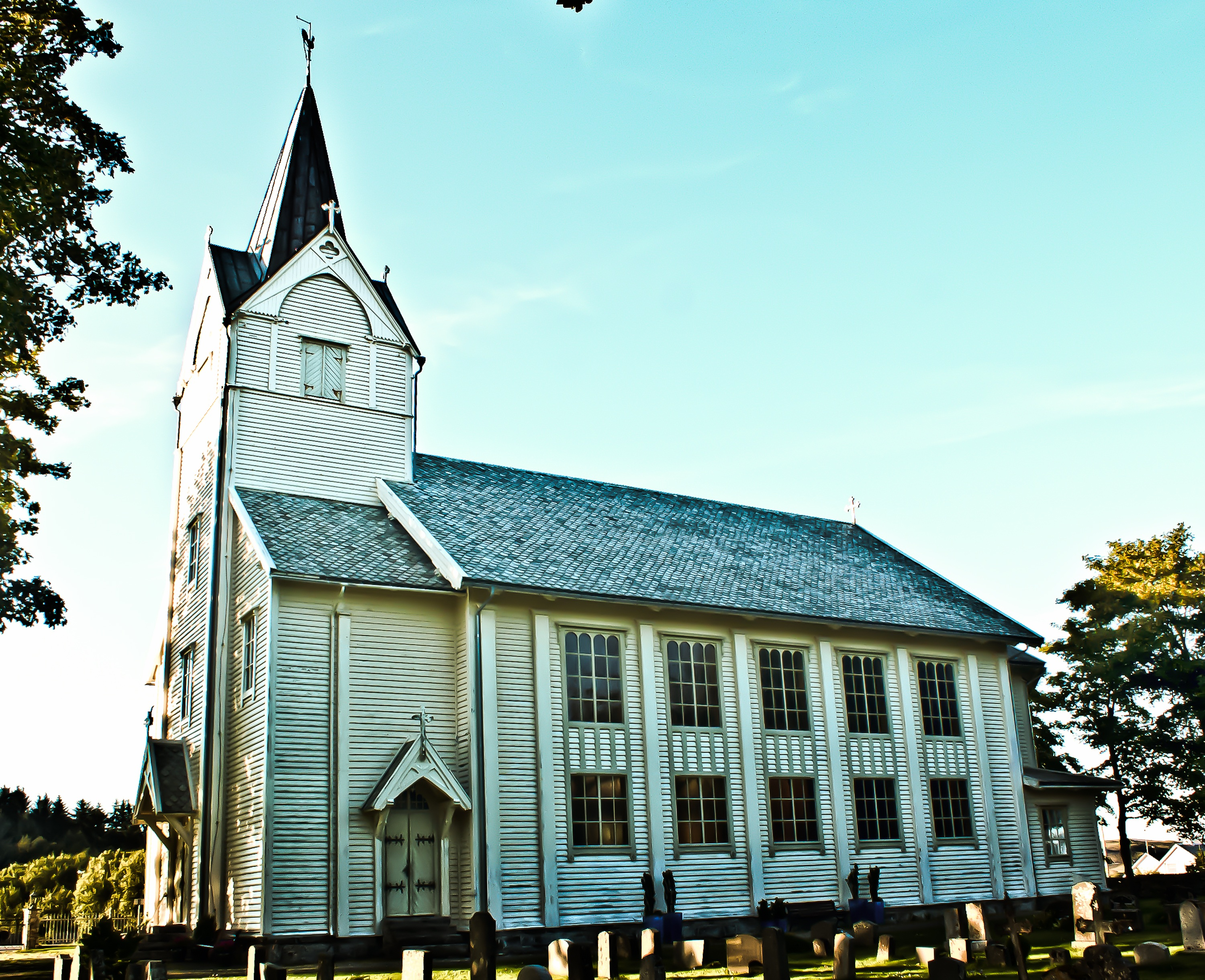 Vigra kirke